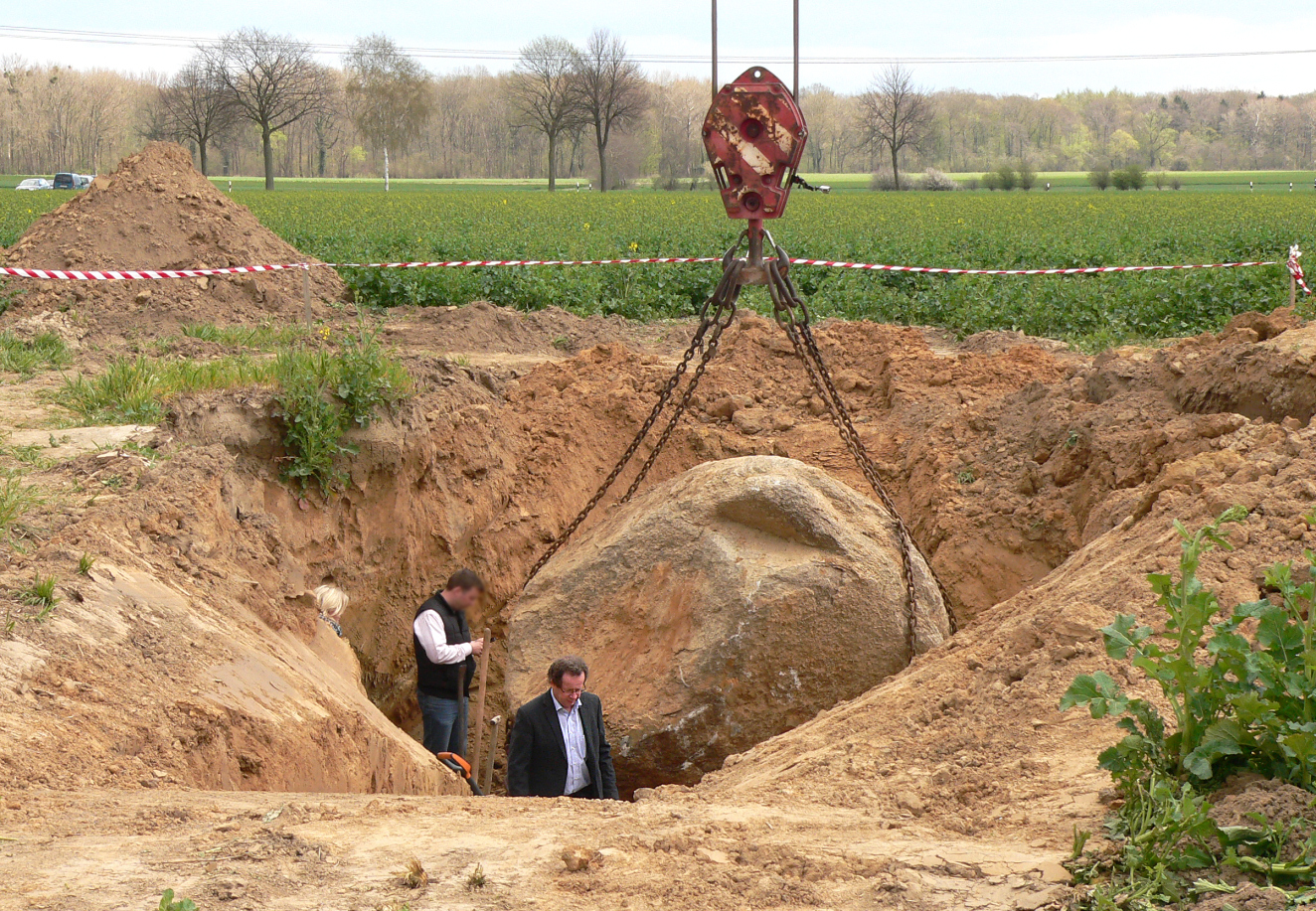 Findling von Ostermunzel noch ungeborgen